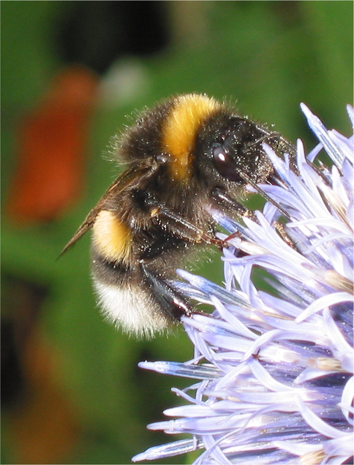 (Grote Aardhommel op kogeldistel) Bombus magnus on Echinops ritro.